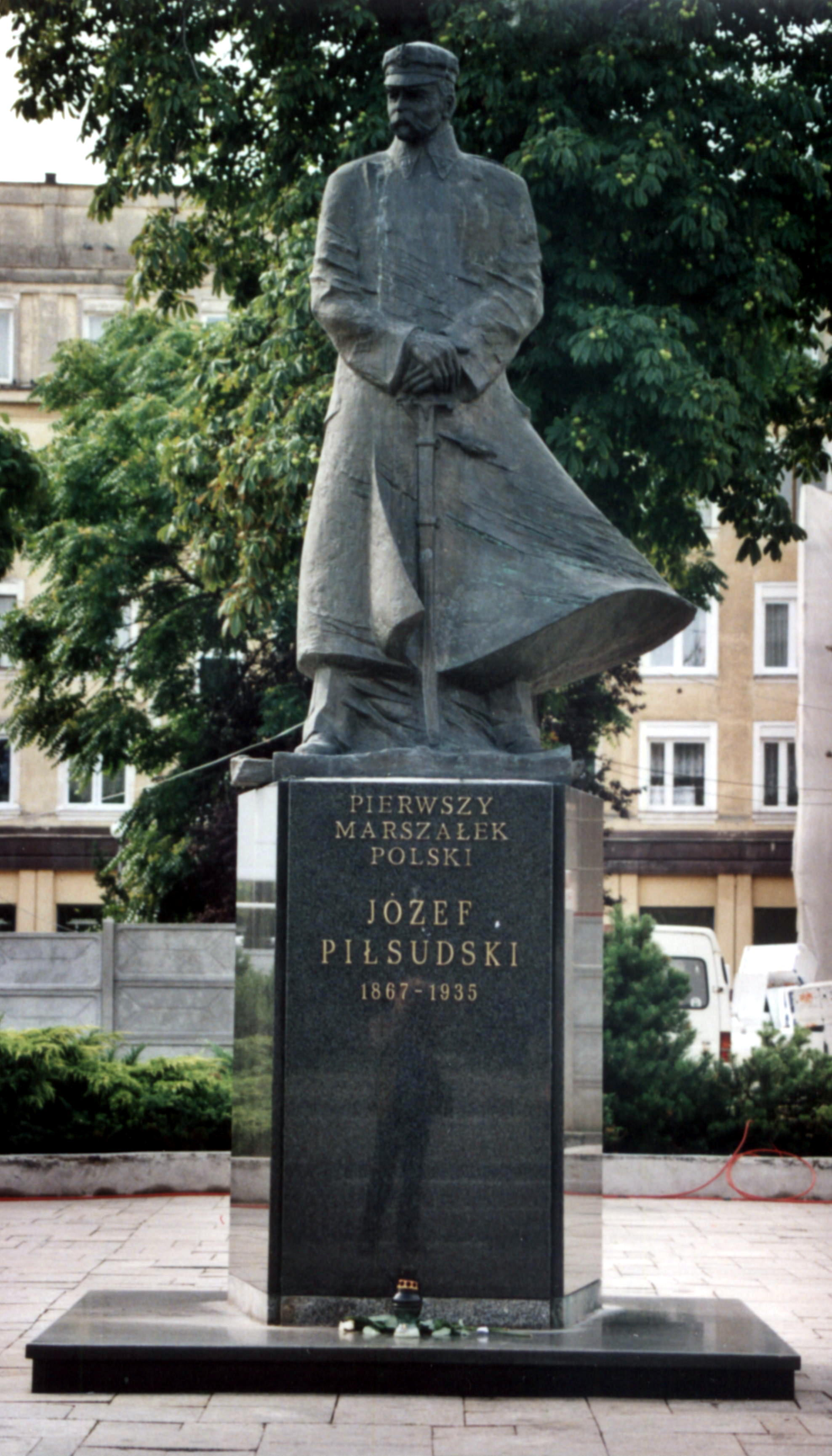 Pomnik J. Piłsudskiego na Placu Biegańskiego w Częstochowie.